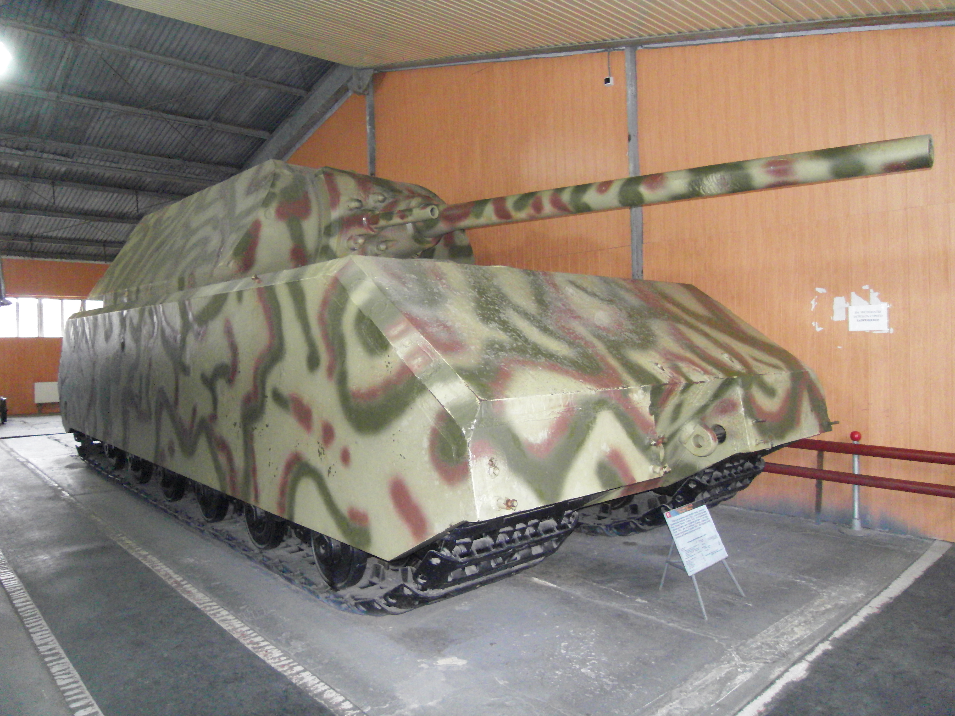 Единственият екземпляр от свръхтежкия германски танк Panzerkampfwagen VIII «Maus», съхраняван в Бронетанковия музей в Кубинка.